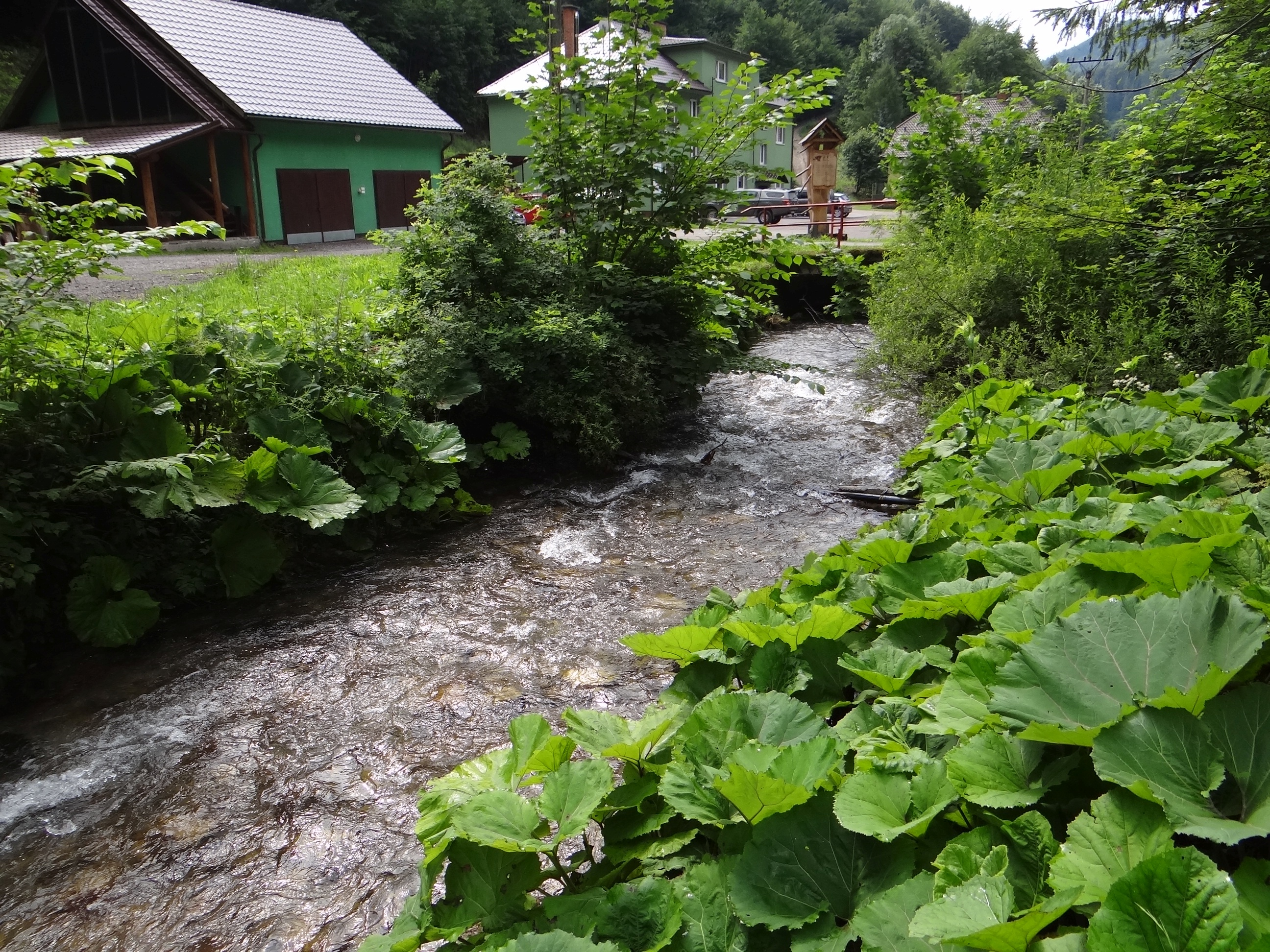 Potok Bystricá W Wielkiej Fatrze